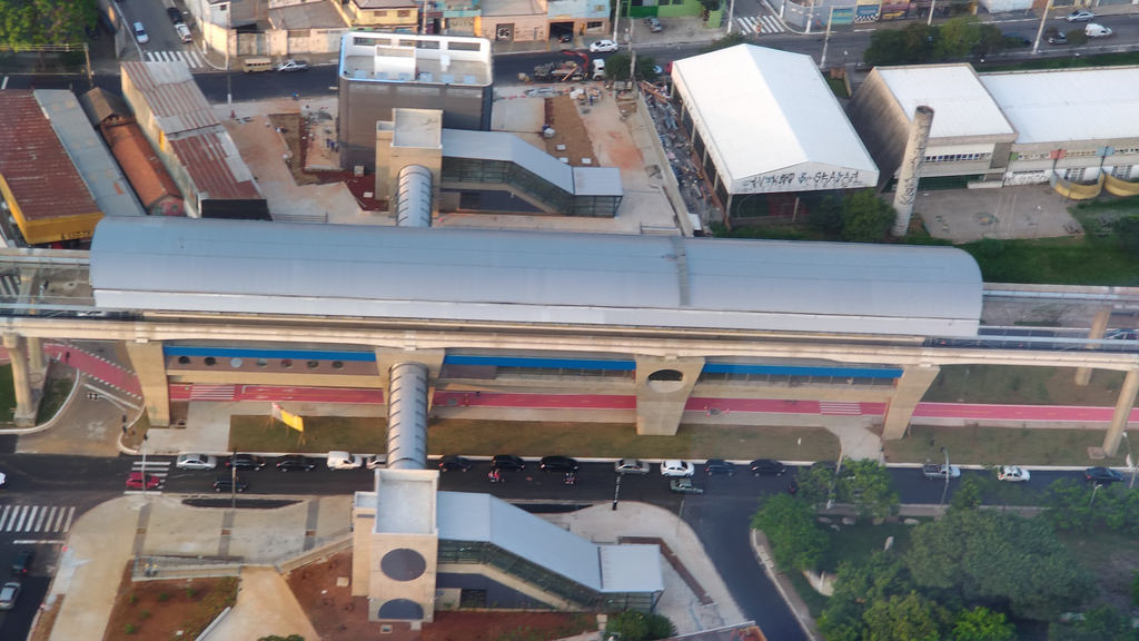 Estação Camilo Haddad da Linha 15 Prata do Metrô de São Paulo em obras. Abril de 2018.